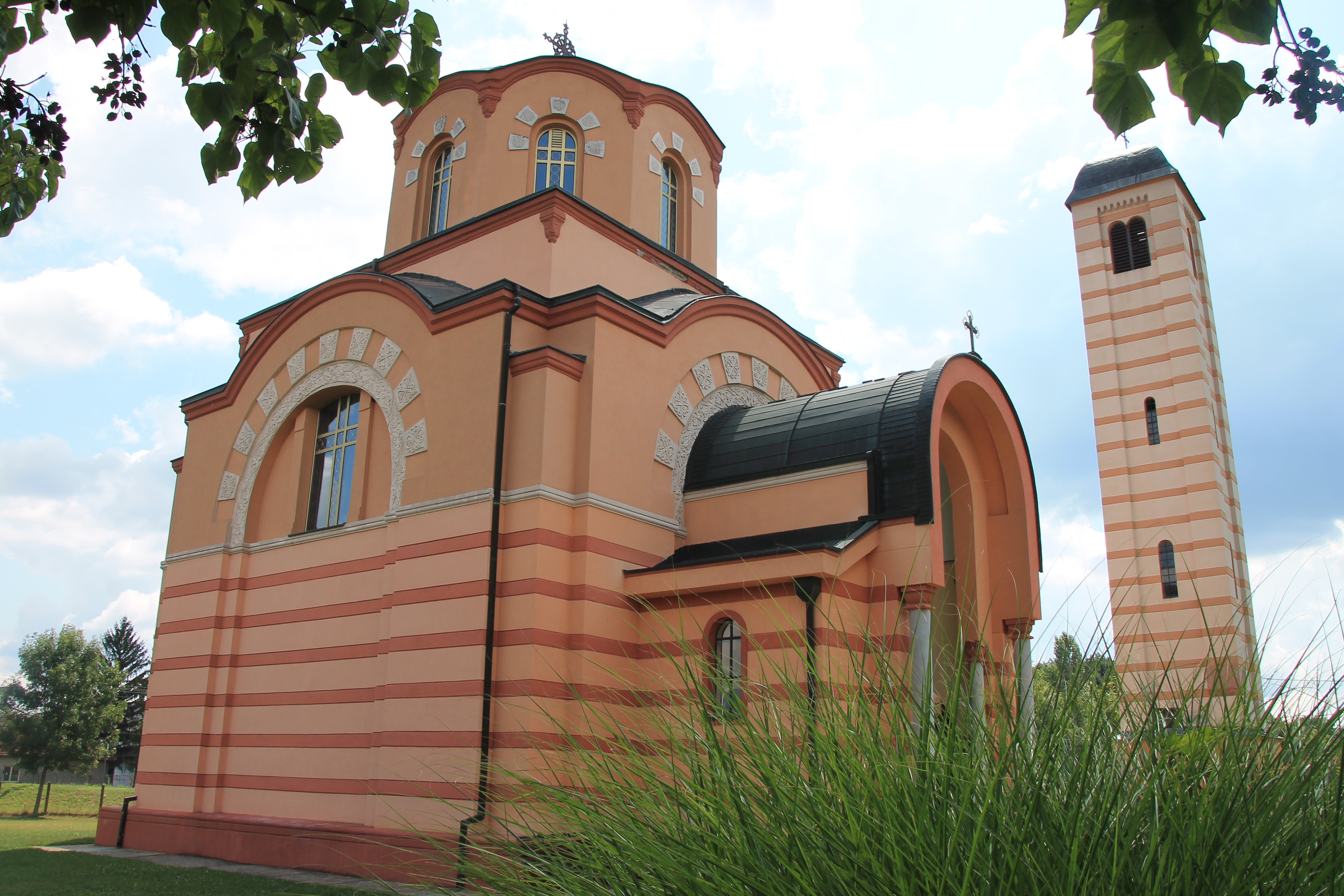 Crkva Prepodobnog Romana Srpskog (Rekovac)